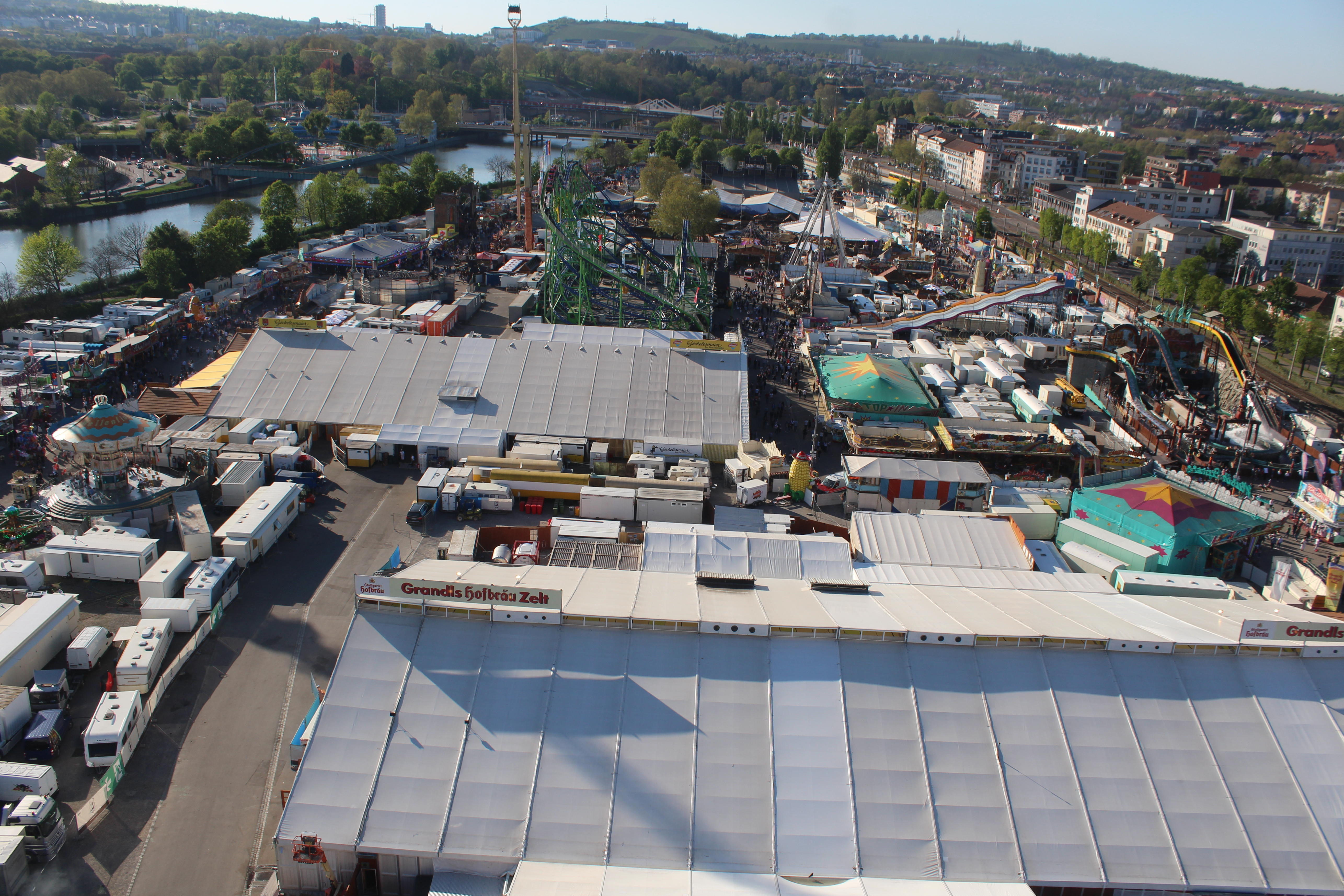 Blick vom Riesenrad des Stuttgarter Frühlingsfestes 2019 auf das Veranstaltungsgelände in nordwestlicher Richtung